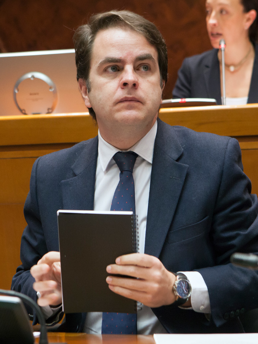 Roberto Bermúdez de Castro fue consejero de Presidencia y portavoz del Gobierno de Aragón la pasada legislatura autonómica